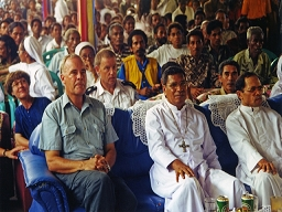 Bischof Belo zu Besuch in Same, 2000